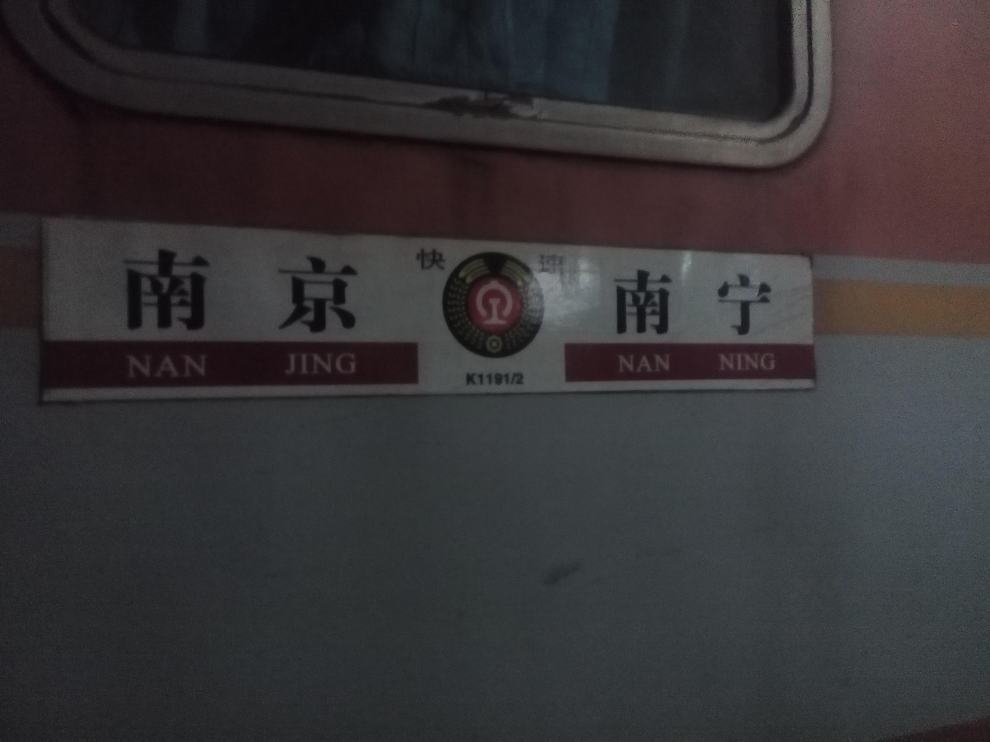 马鞍山站。